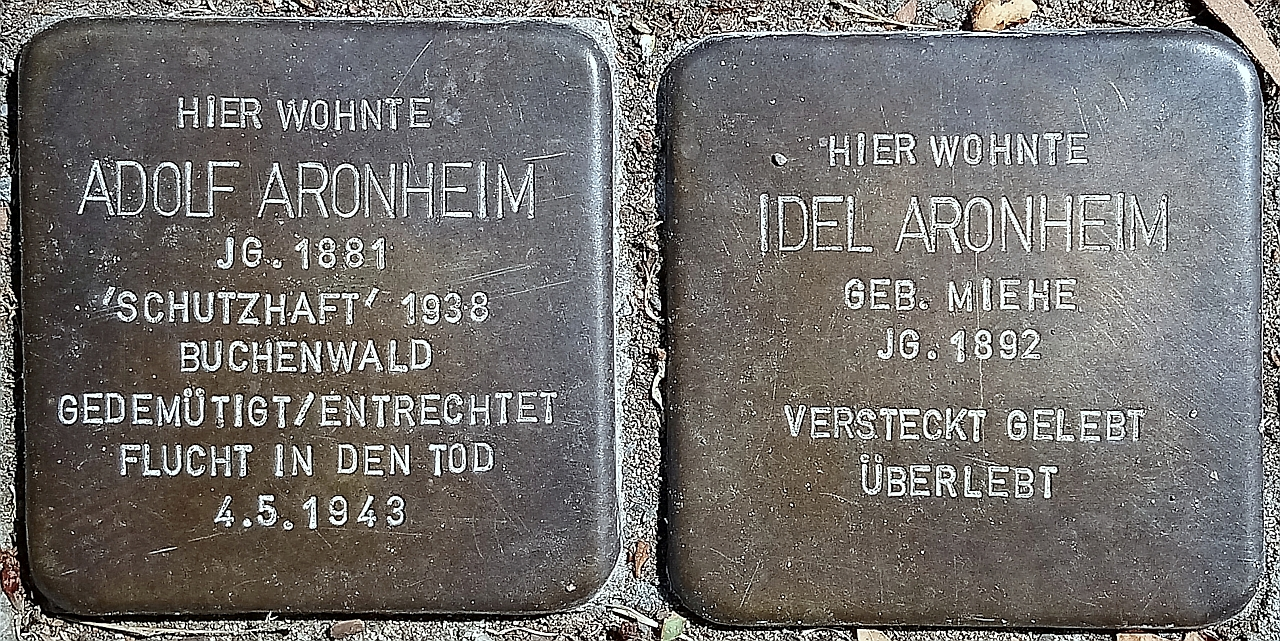 Braunschweig, Inselwall 4: Stolperstein für Adolf Aronheim (1881–1943).